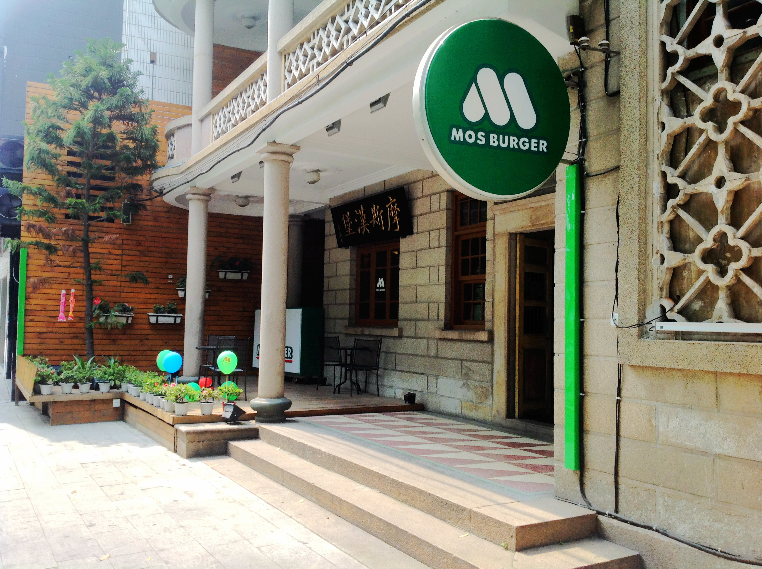 摩斯汉堡泉州九一街店